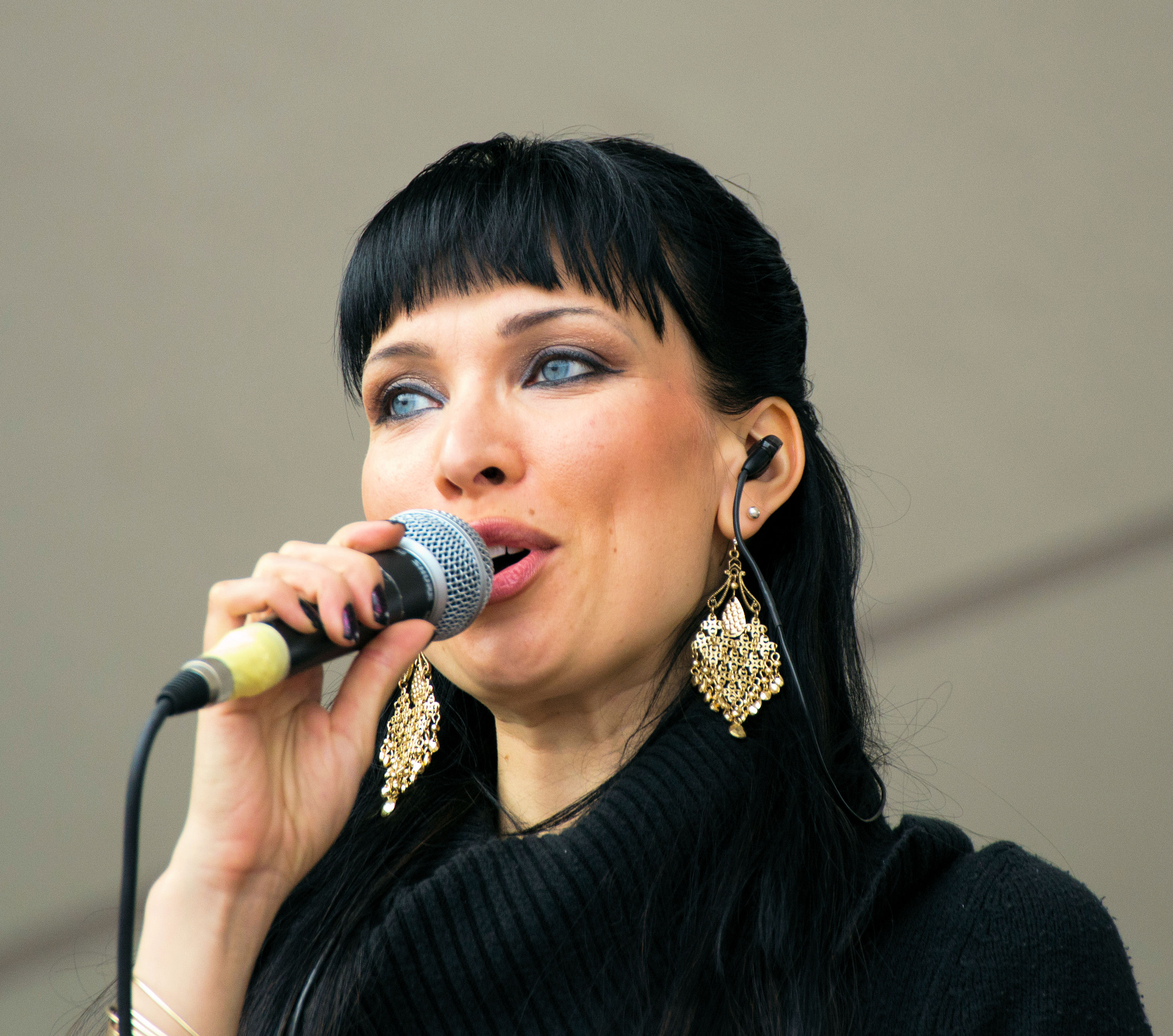 Mervi Koponen, suomalainen laulaja